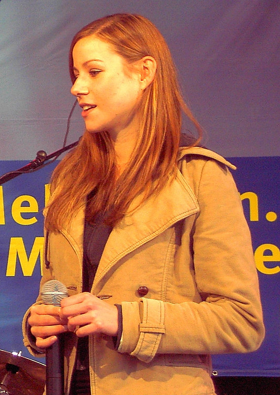 Katrin Heß während eines öffentlichen Auftritts beim Tag der Offenen Tür in Aachen